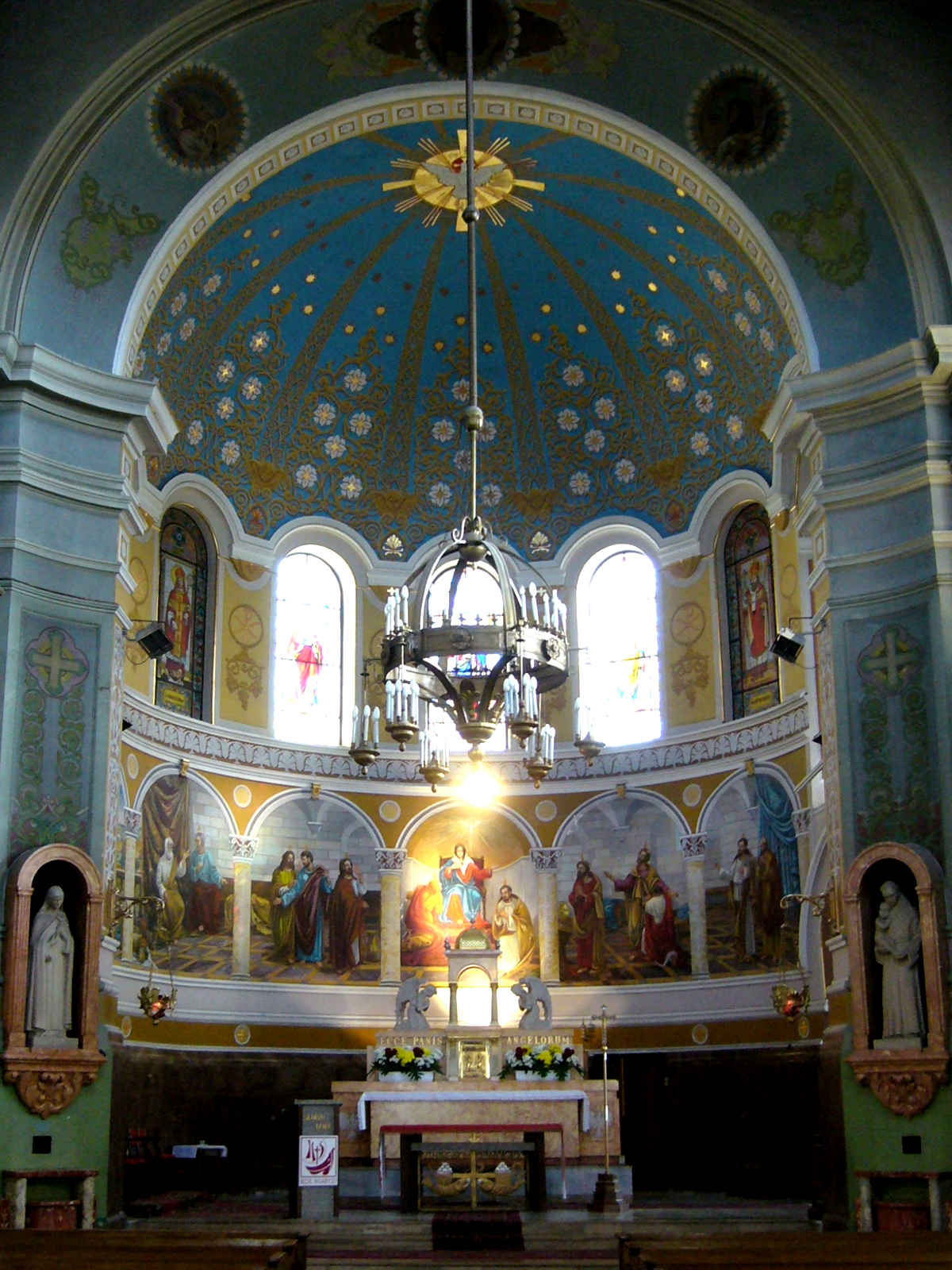 Zdjęcie przedstawia polichromię wg projektu i wykonawstwa łódzkiego artysty malarza Mieczysława Saara. Kościół Zesłania Ducha Świętego w Łodzi przy ul. Piotrkowskiej 2/2a (w sąsiedztwie Placu Wolności).